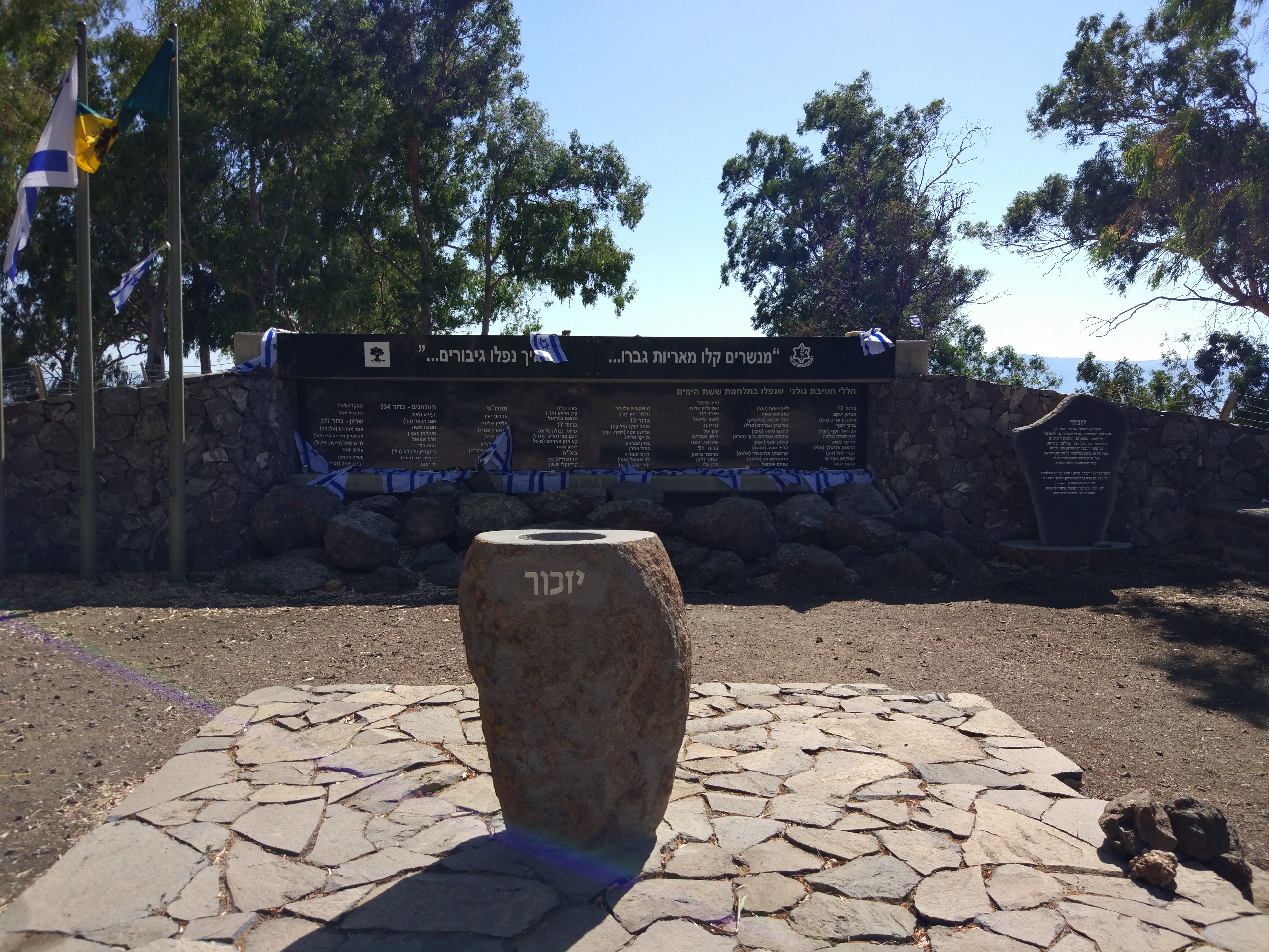 האנדרטה המרכזית בתל פאחר לאחר חידושה במלואת 50 שנים למלחמה. יולי 2017